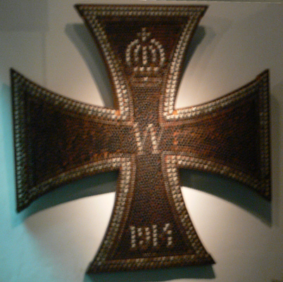 Erfurter Nagelkreuz von 1914